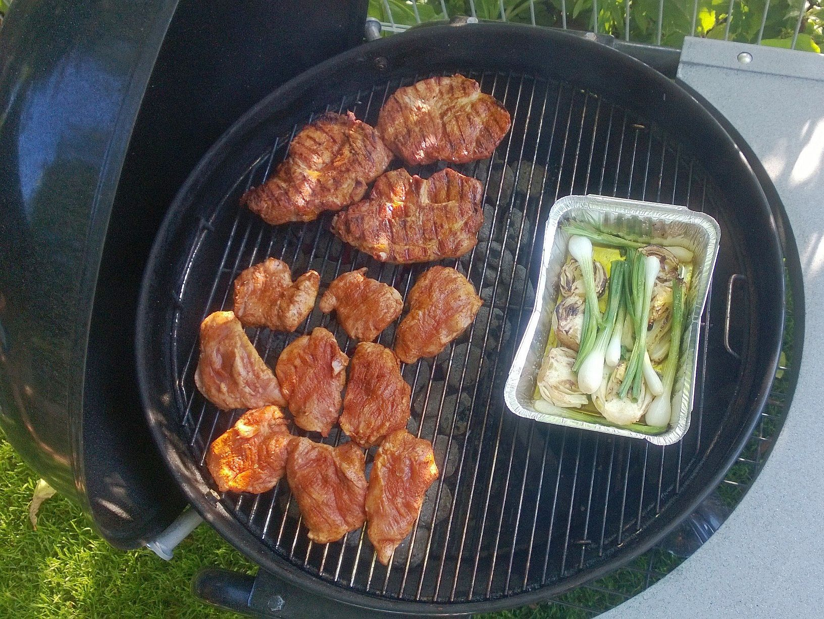 porksteaks and veggis on Weber OneTouch Platinum 22,5" Schweinenacken- und Filetsteaks mit Frühlingslauch und Fenchel auf dem Weber OneTouch Platinum 57 cm Autor: Thogru